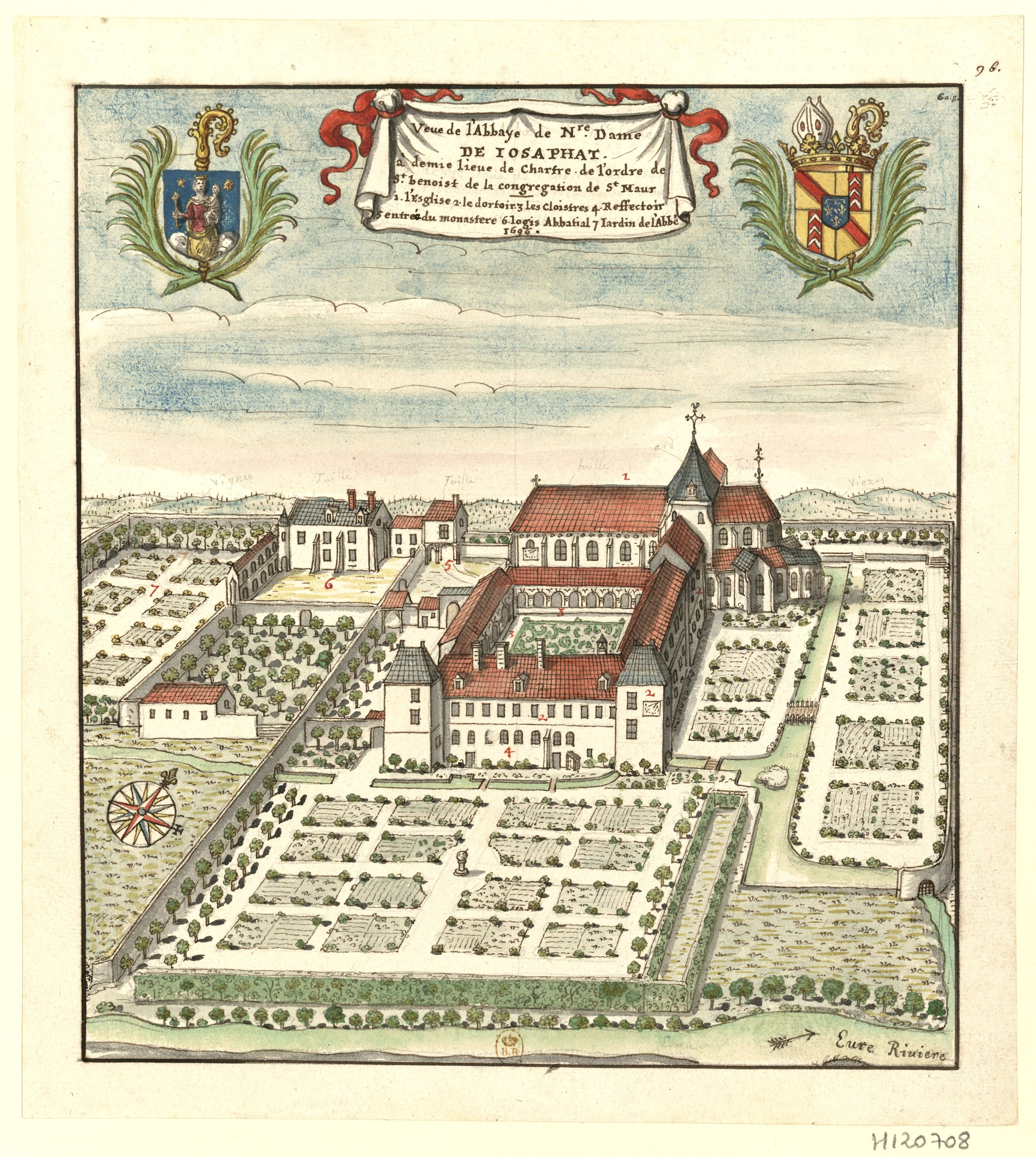 Vue de l'Abbaye de Notre Dame de Josaphat, a une demi-lieue de Chartres, de l'ordre de la Congrégation de St-Maur, en 1696.